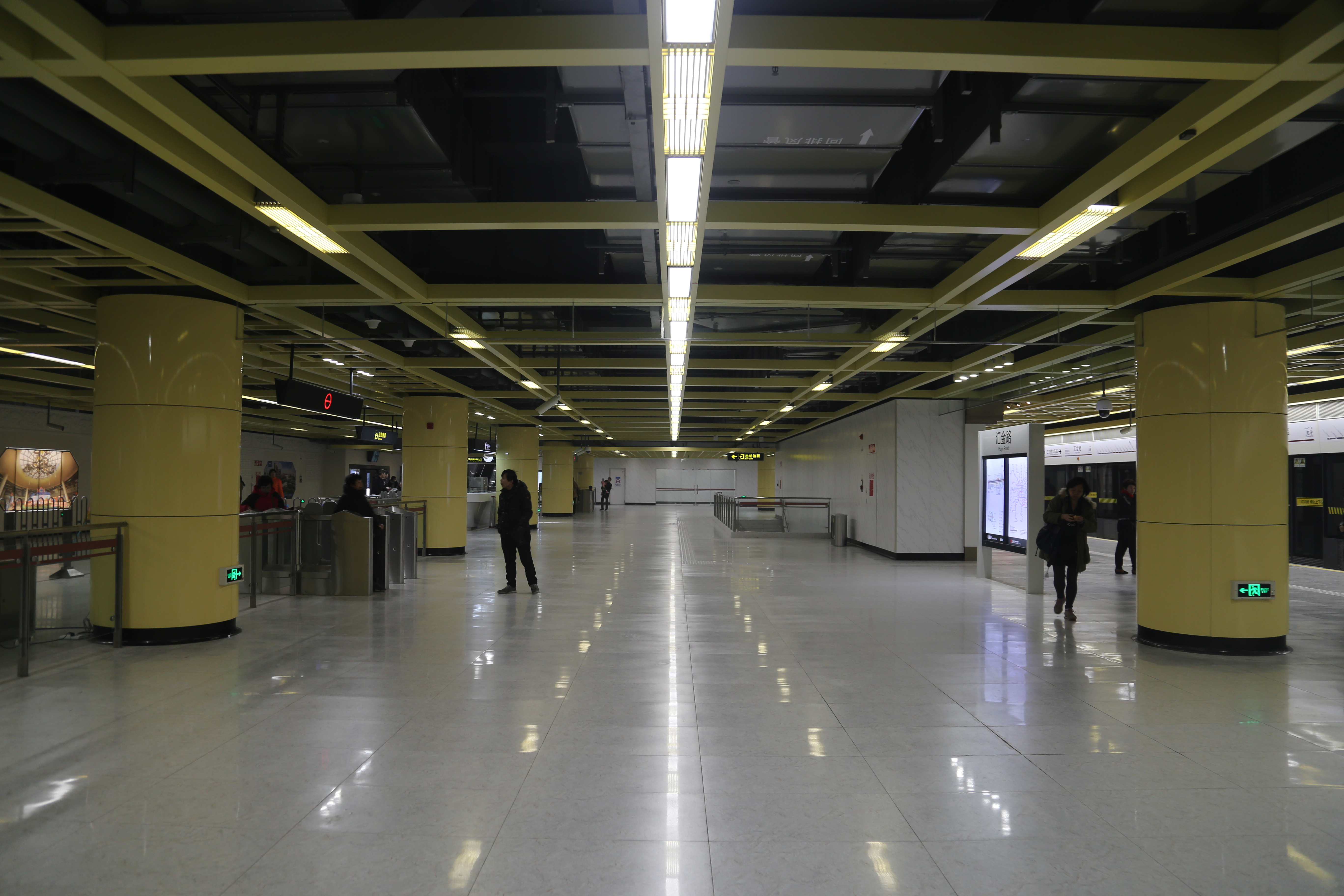 汇金路站站厅（与站台同层）